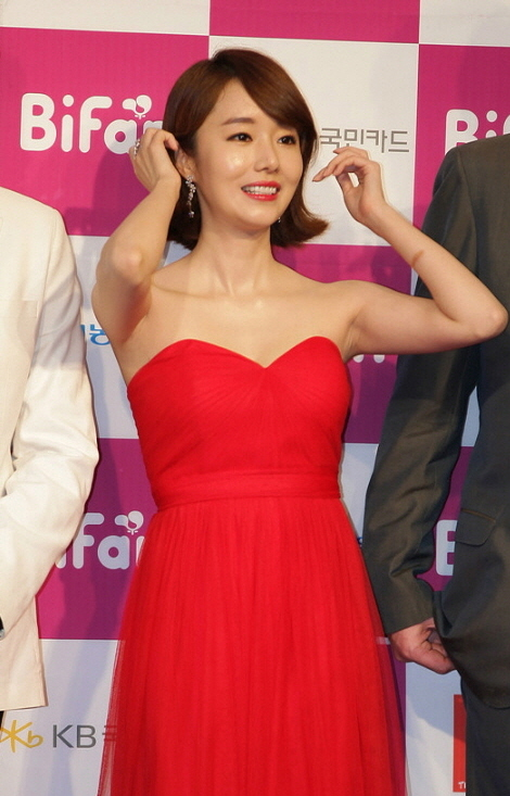 제19회 부천국제판타스틱영화제 폐막식 레드카펫